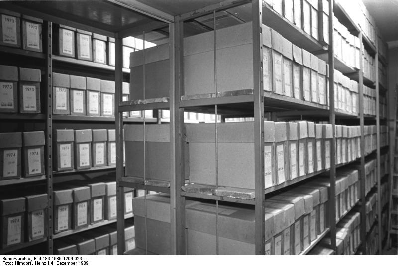 Erfurt, Bezirks-Archiv des Ministeriums für Staatssicherheit ADN-ZB/Hirndorf/4.12.89/Erfurt: Beweismaterial sichergestellt./ In den Räumen der Bezirksbehörde des ehemaligen Ministeriums für Staatssicherheit wurden umfangreiche Bestände des Archives beschlagnahmt und durch den Militärstaatsanwalt sichergestellt.